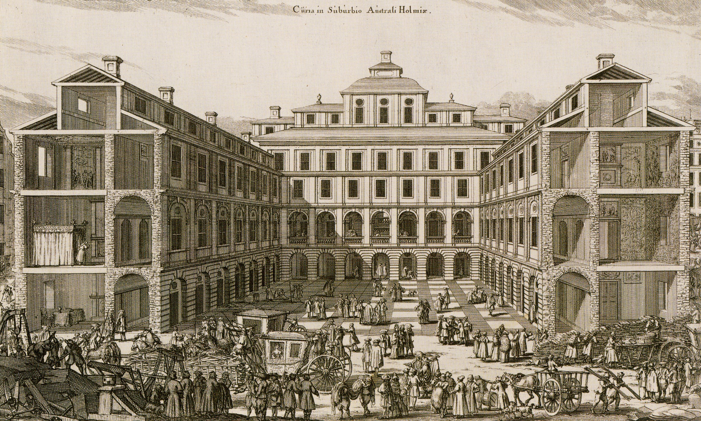 Södra stadshuset, numera Stockholms stadsmuseum, Kopparstick av Willem Swidde. Ur Suecia Antiqua et Hodierna.